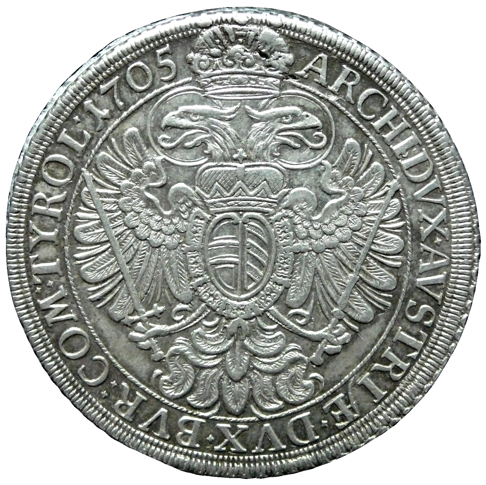 Österreichischer Reichsspeziestaler 1705 Antrittstaler des Kaisers Joseph I. Erzherzogtum Österreich im Heiligen Römischen Reich Deutscher Nation Vom Reichsmünzfuß abweichende Prägung 8,11 Stück a.d.r. Mark, 9,24 Stück a.d.f. Mark Silber 14 Lot 1 Grän = 878,5‰ Feingewicht: 25,318 g Raugewicht: 28,82 g nach Reichsmünzdeputation von 1623 Prägung 1705-1711 Münzstätte Wien Münzmeister Matthias Mittermayer von Waffenberg (1679-1708) Münzeisenschneider Johann Michael Hoffmann (1680-1736) Außerkurssetzung nach Einführung des Konventionsmünzfußes 1748 für 1 Taler 10 Groschen Konventionsgeld Gewicht: 28,56 g Durchmesser: 44,26-44,55 mm Dicke: 2,42 mm Gliederkettenrand Nimbierter Doppeladler unter schwebender Kaiserkrone, in den Fängen Schwert und Zepter, auf der Brust gekröntes hochgeteiltes Wappenschild (Bindenschild und Burgund), umgeben von Kette vom Goldenen Vlies; Fortsetzung der Titelumschrift mit Schnurkreis oben nach Krone beginnend nach rechts: ARCHIDUX AUSTRIAE DUX BURGUNDIAE COMES TYROLIS = Erzherzog von Österreich, Herzog von Burgund, Graf von Tirol